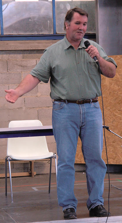 Tim Guénard se produisant devant un public d'élèves à Rodez.